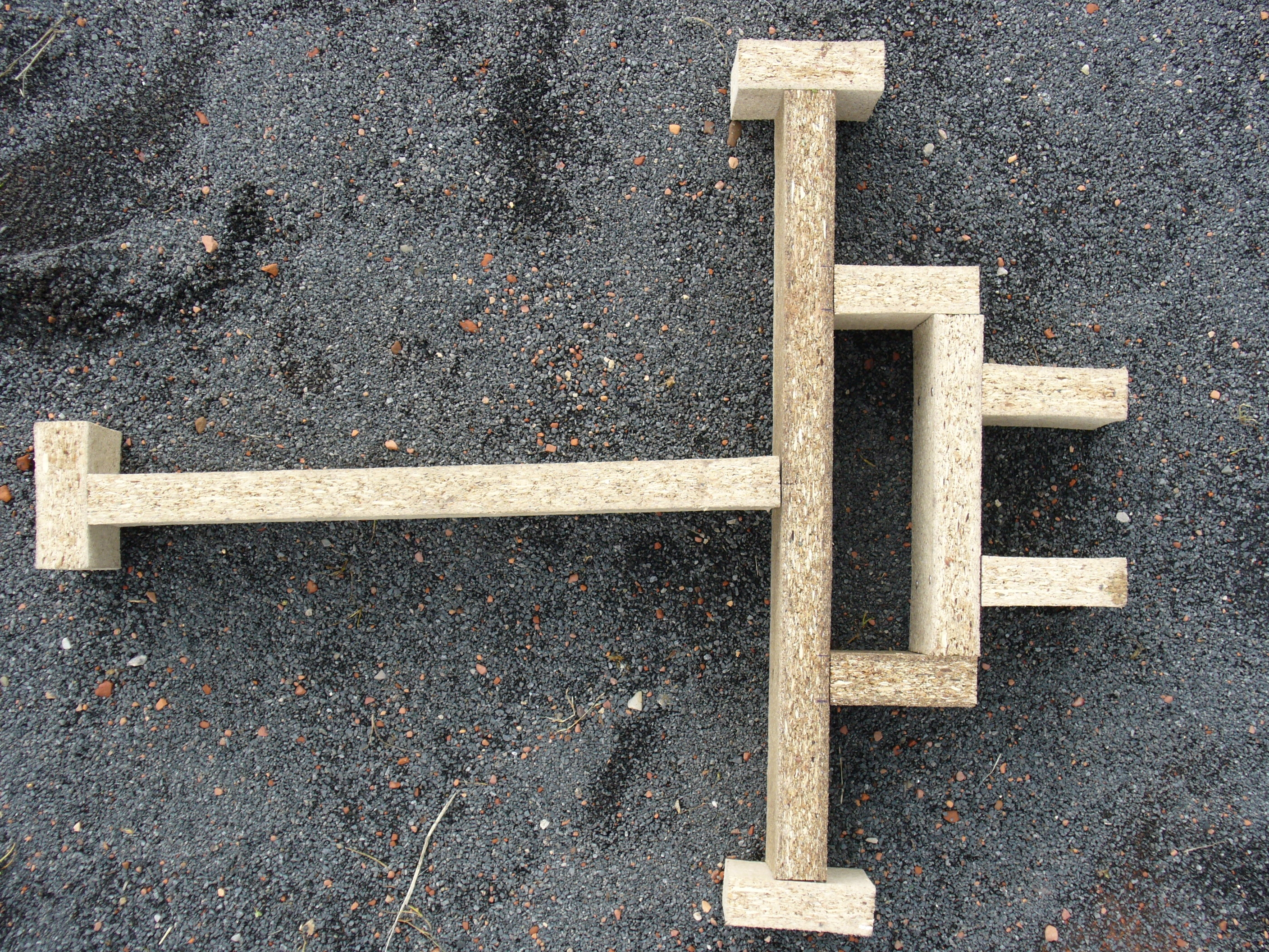 Narzędzie używane do ustawiania celów i przeszkód do konkursu strzału precyzyjnego. Żywiec 2007